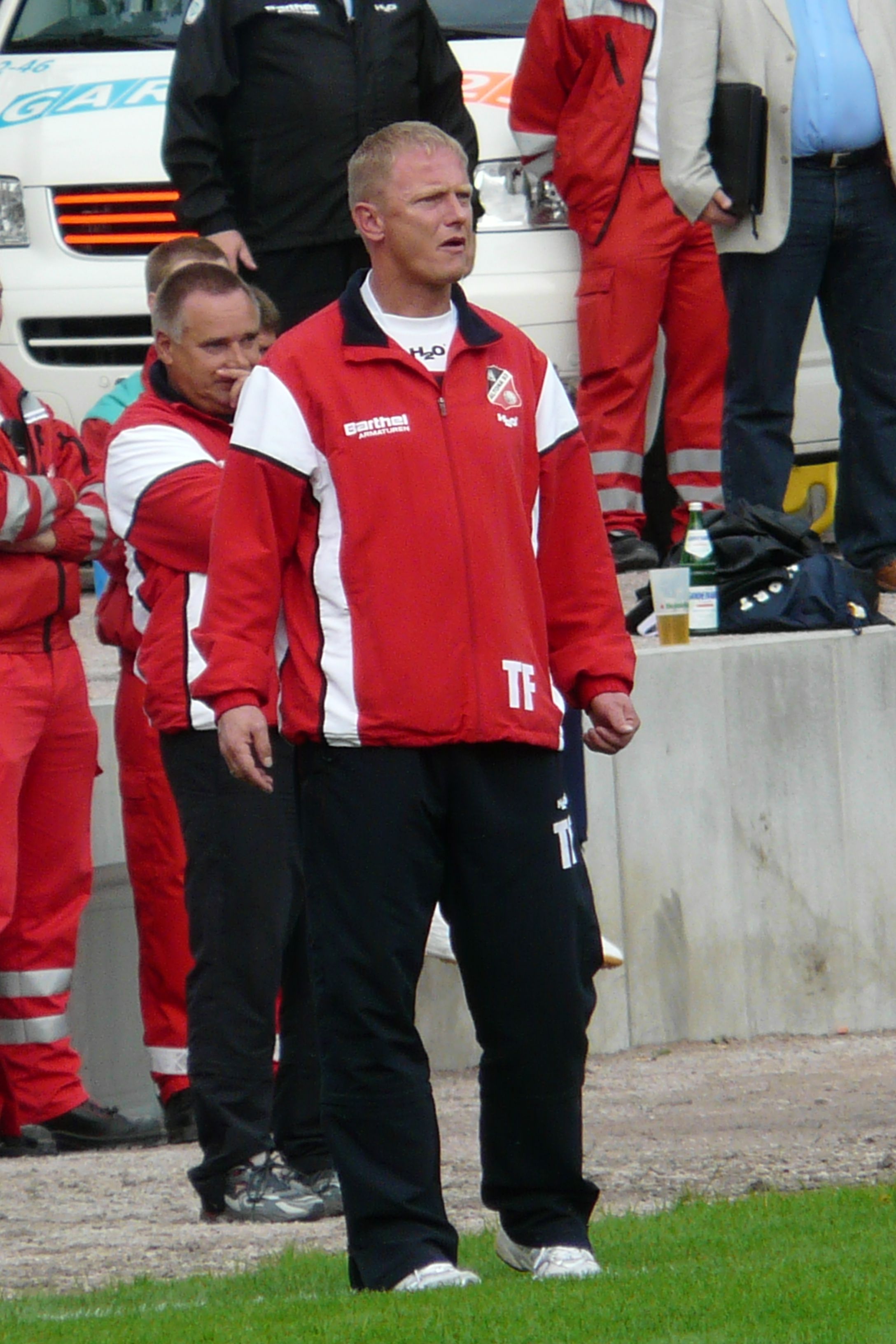 Torsten Fröhling